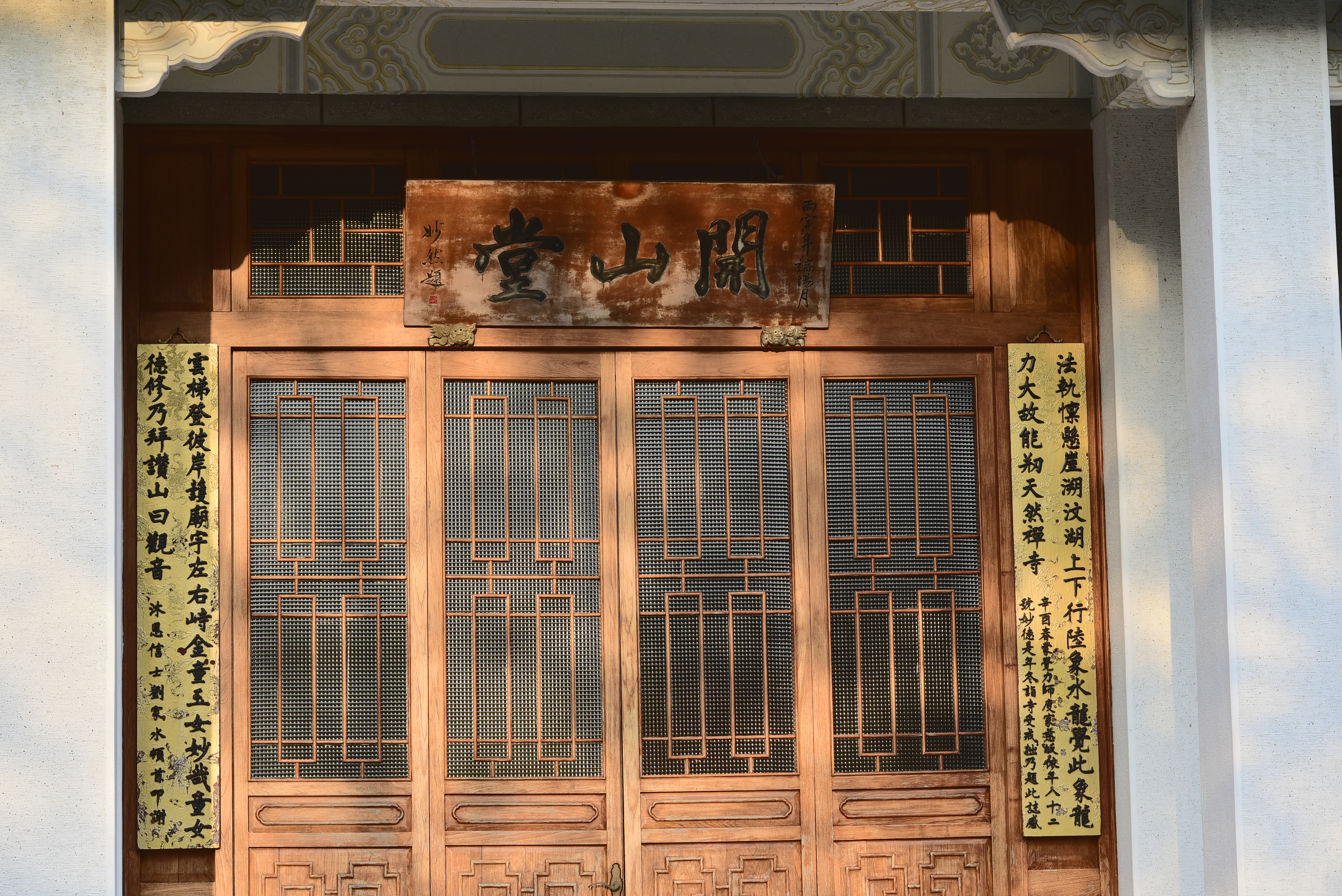 中文（台灣）: 大湖法雲禪寺開山堂2017